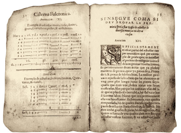 paginas de la Csterna Fulconicra de Joan Frances Fulconis, Lyon 1562, lenga provençala